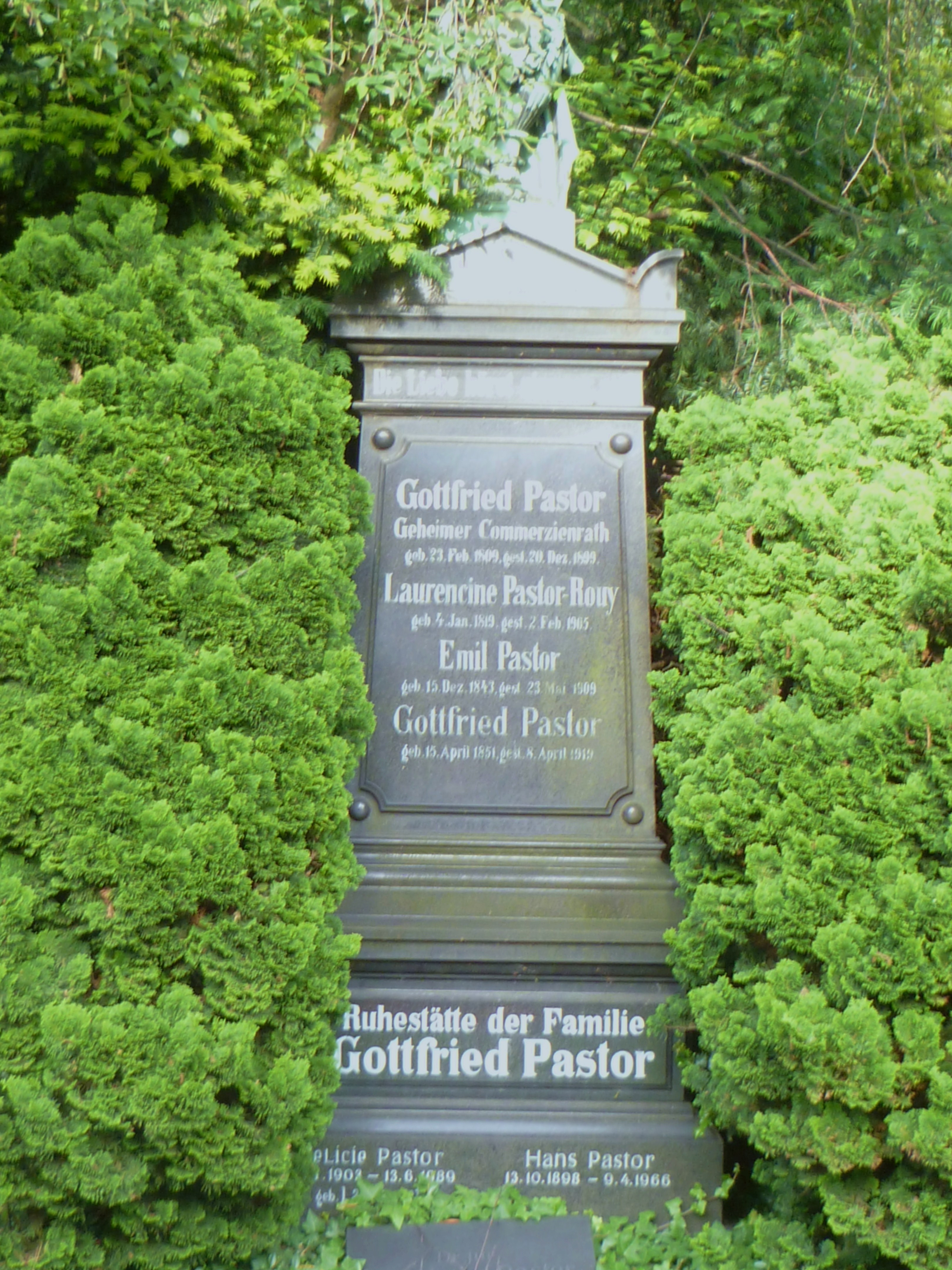 eigene Fotographie der Grabstele Gottfried Pastor